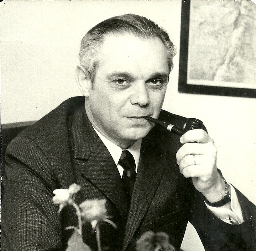 אלישיב בן חורין יושב במשרדו ומצטלם יחד עם המקטרת